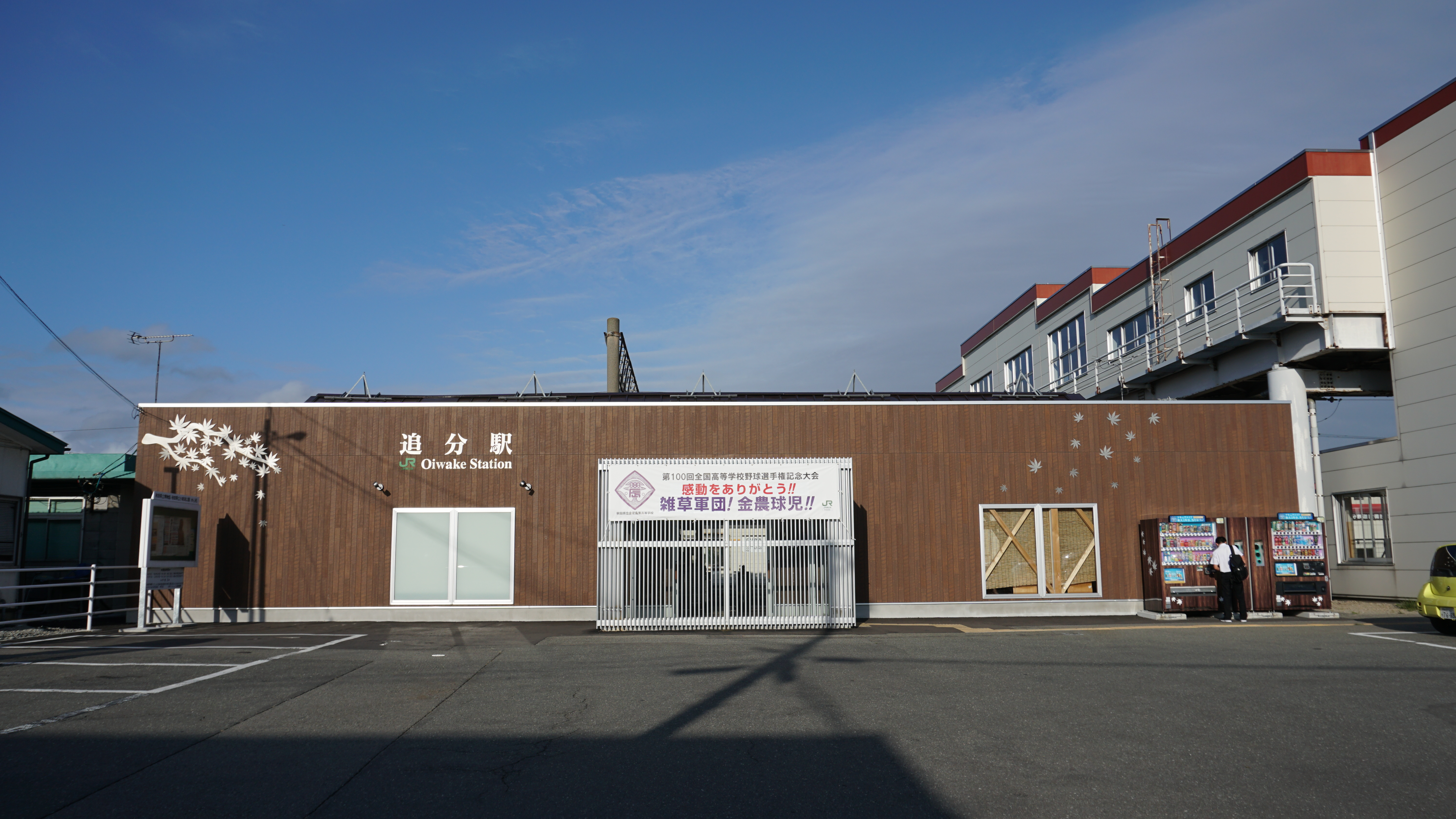 奥羽本線 追分駅。駅入口には同駅最寄りの秋田県立金足農業高等学校の甲子園準優勝を称える横断幕が掲示されている。同校野球部は伝統的に「雑草軍団」と形容される。